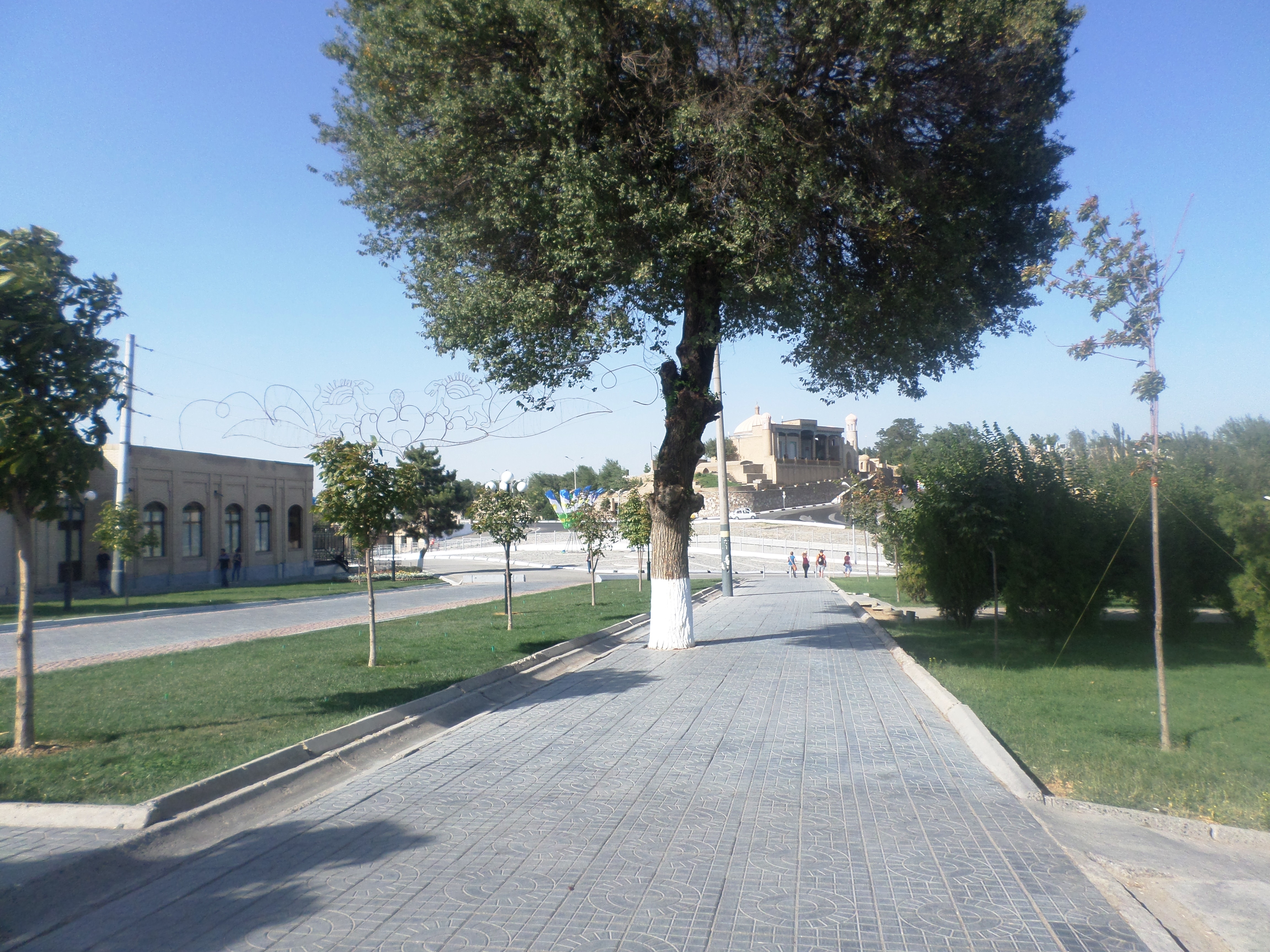 Достопримечательности Самарканда, Улица возле Мечети Биби Ханум